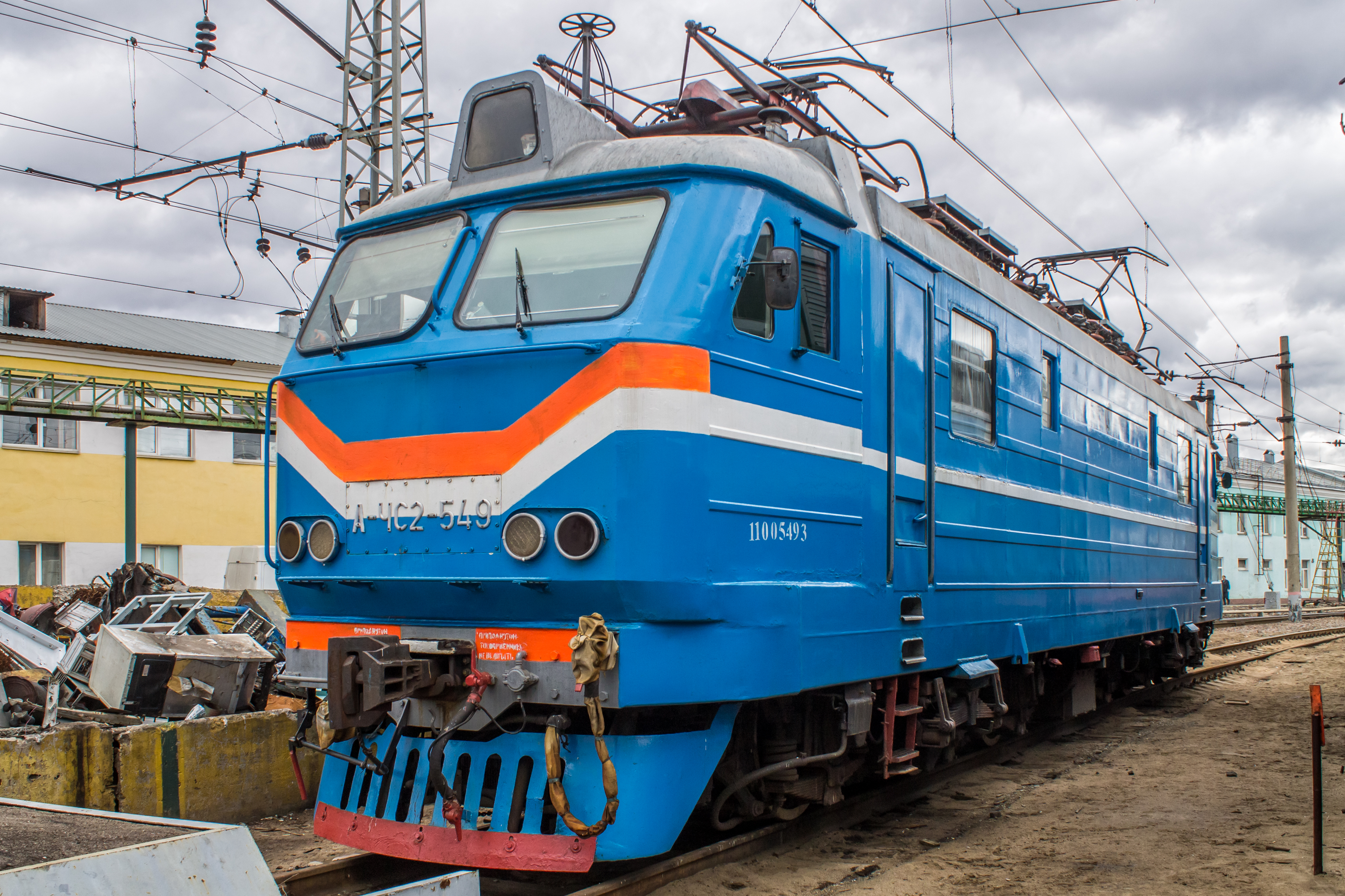 А-ЧС2-549, депо Москва-Пассажирская-Курская см. фото 693041 в альбоме автора